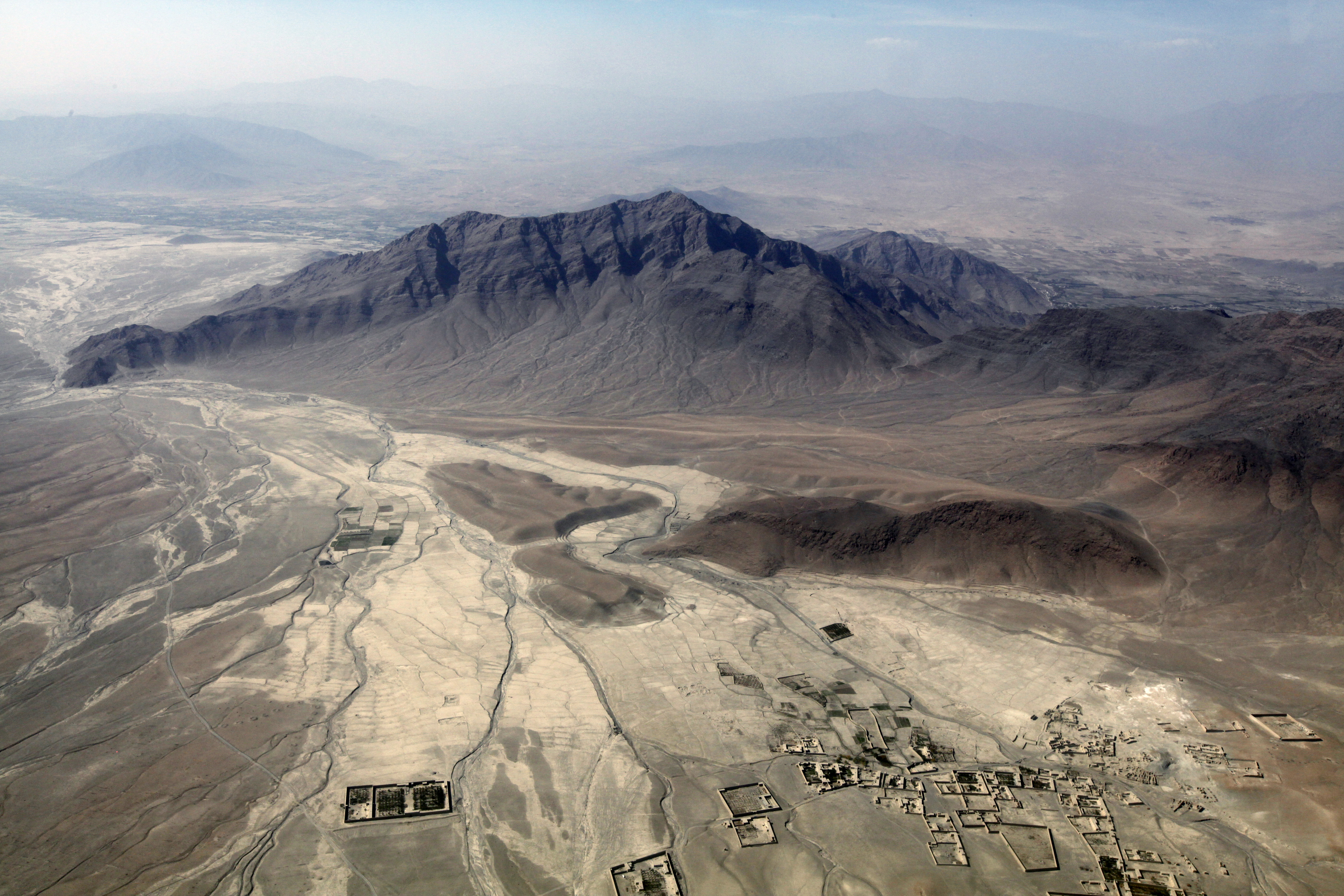 アフガニスタンのローガル州の黒い山